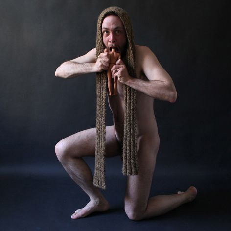 Vater